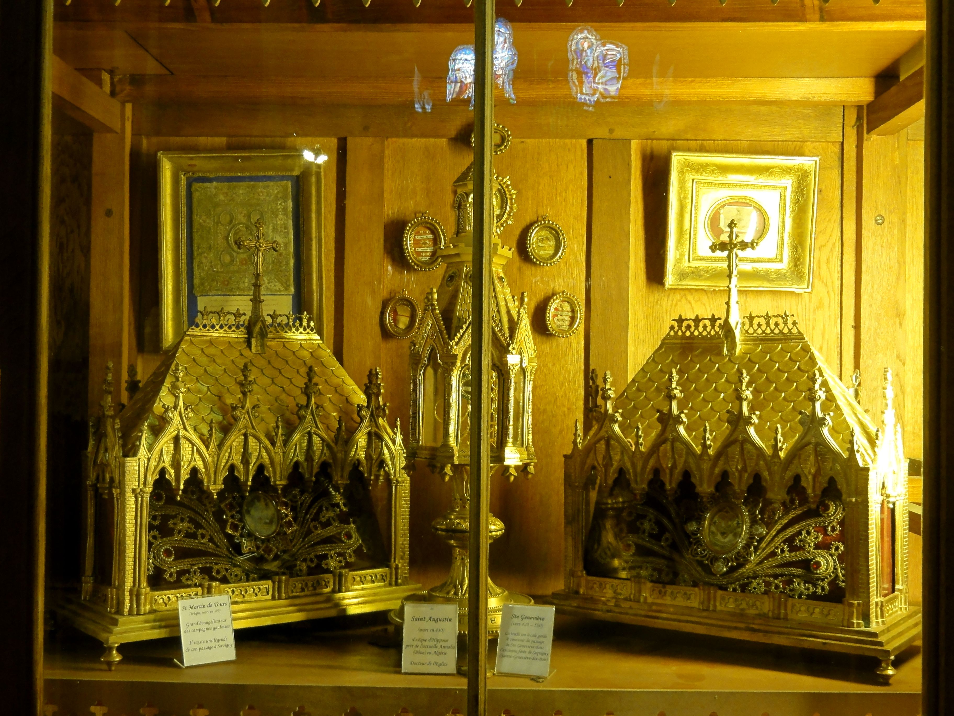 Grand reliquaire, 3e colonne, 1er étage.